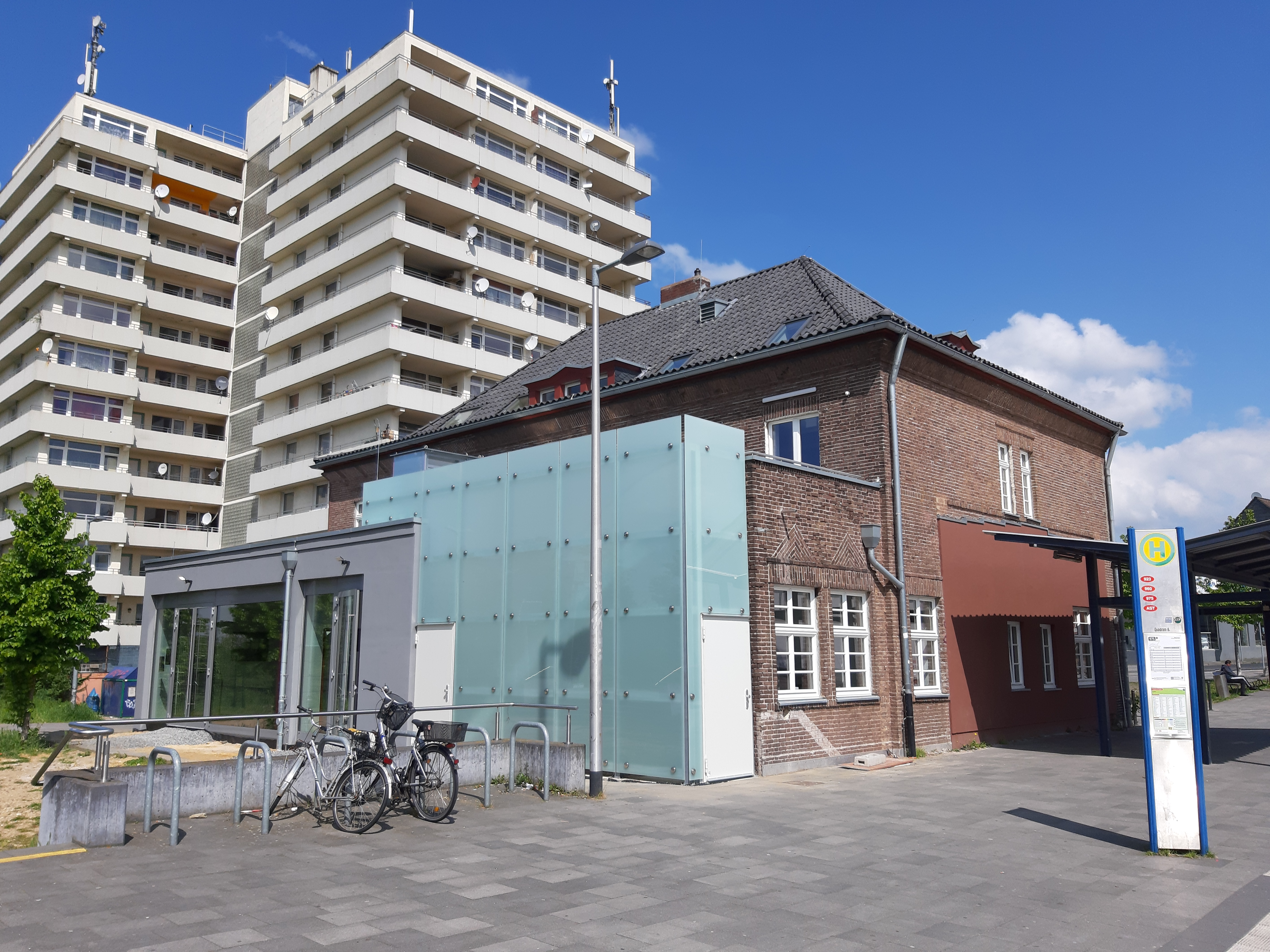 Rückseite Bahnhof Quadrath-Ichendorf